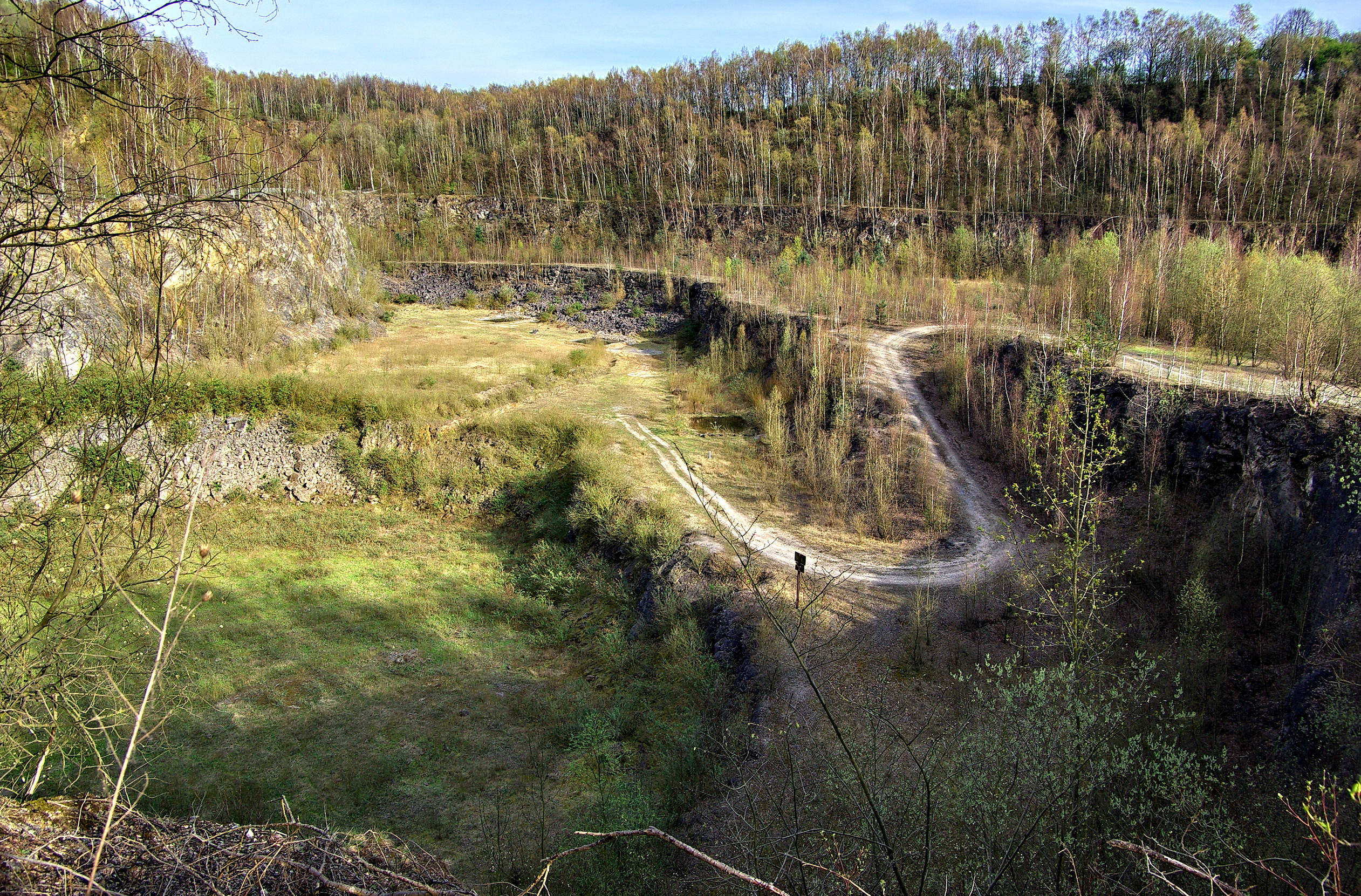 Blick in die Grube 7 bei Gruiten, Nähe Erkrath